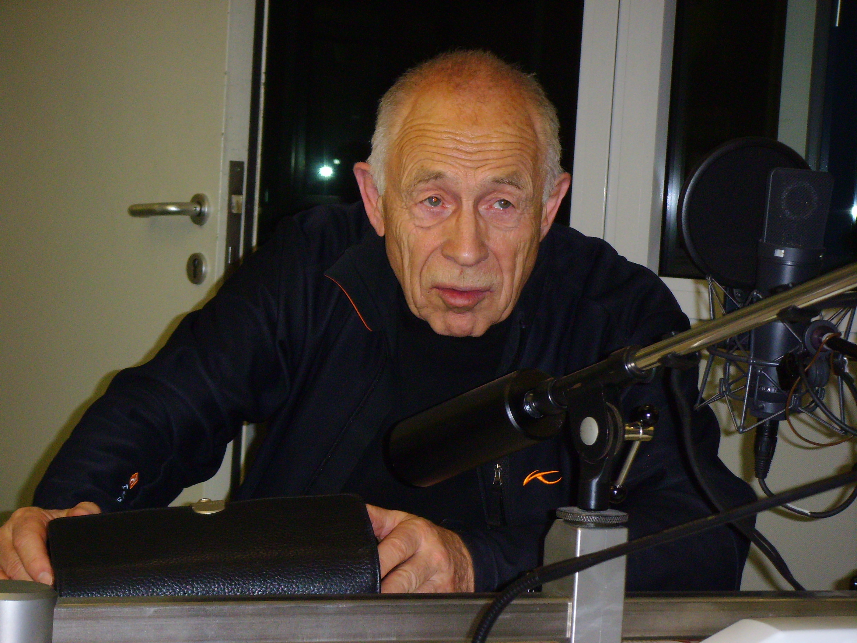 Heiner Geißler, deutscher Politiker. Er war von 1982 bis 1985 Bundesminister für Jugend, Familie und Gesundheit und von 1977 bis 1989 Generalsekretär der CDU.